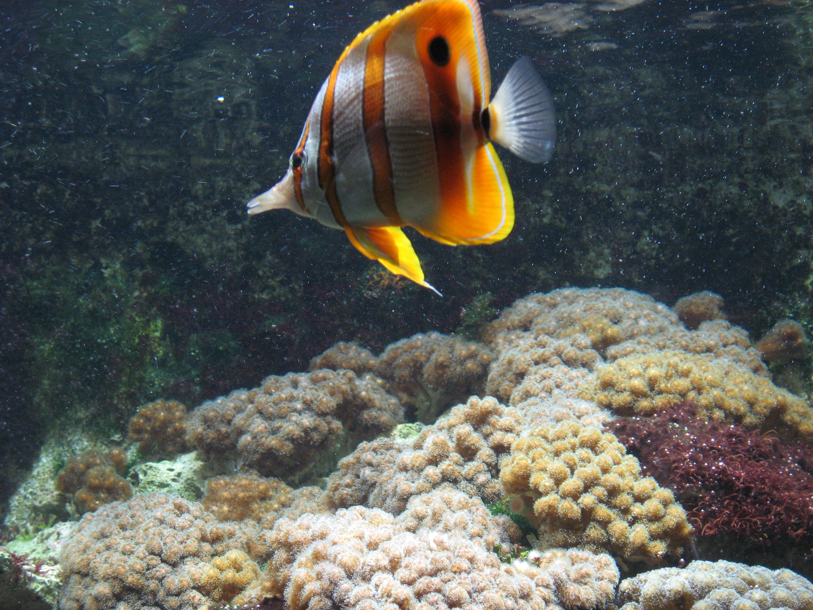 Chelmon rostratus in Muséum-aquarium de Nancy Map: 48° 41' 41" N 6° 11' 18" E